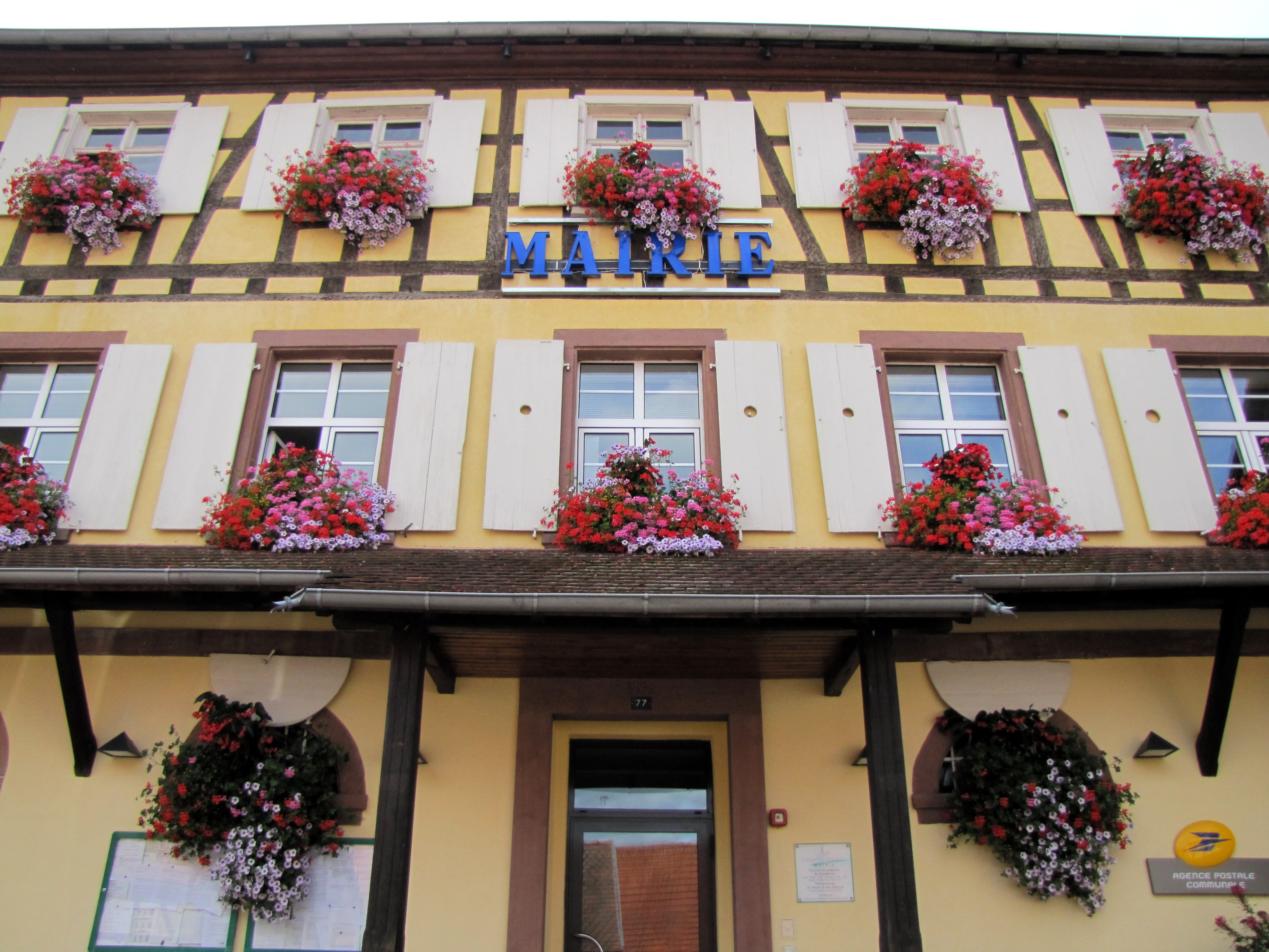 Alsace, Bas-Rhin, Langensoultzbach, Mairie (1825). .